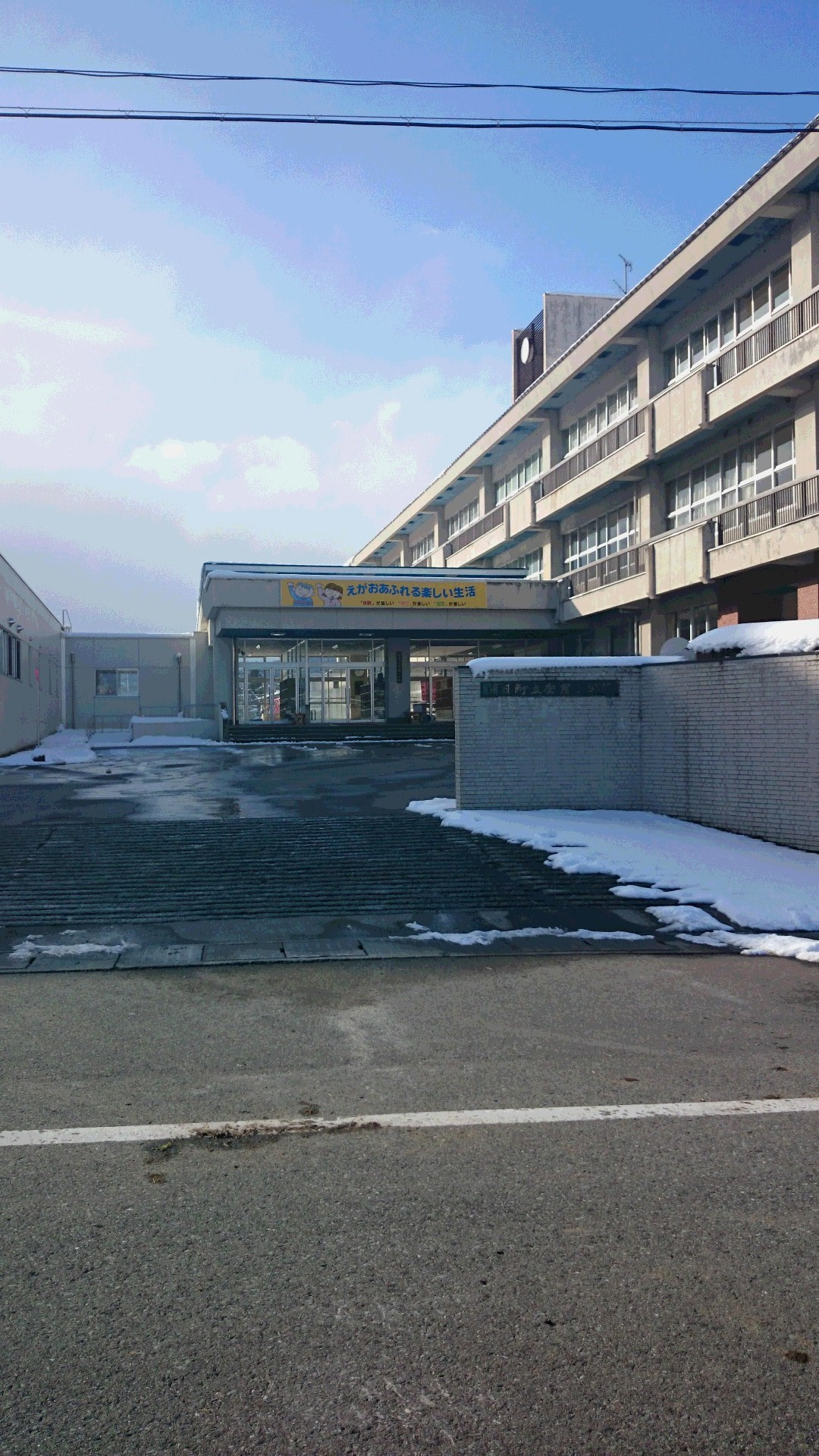 朝日町立宮宿小学校